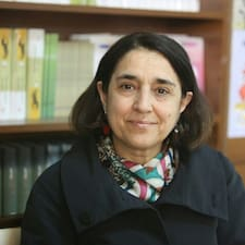 ecrivan